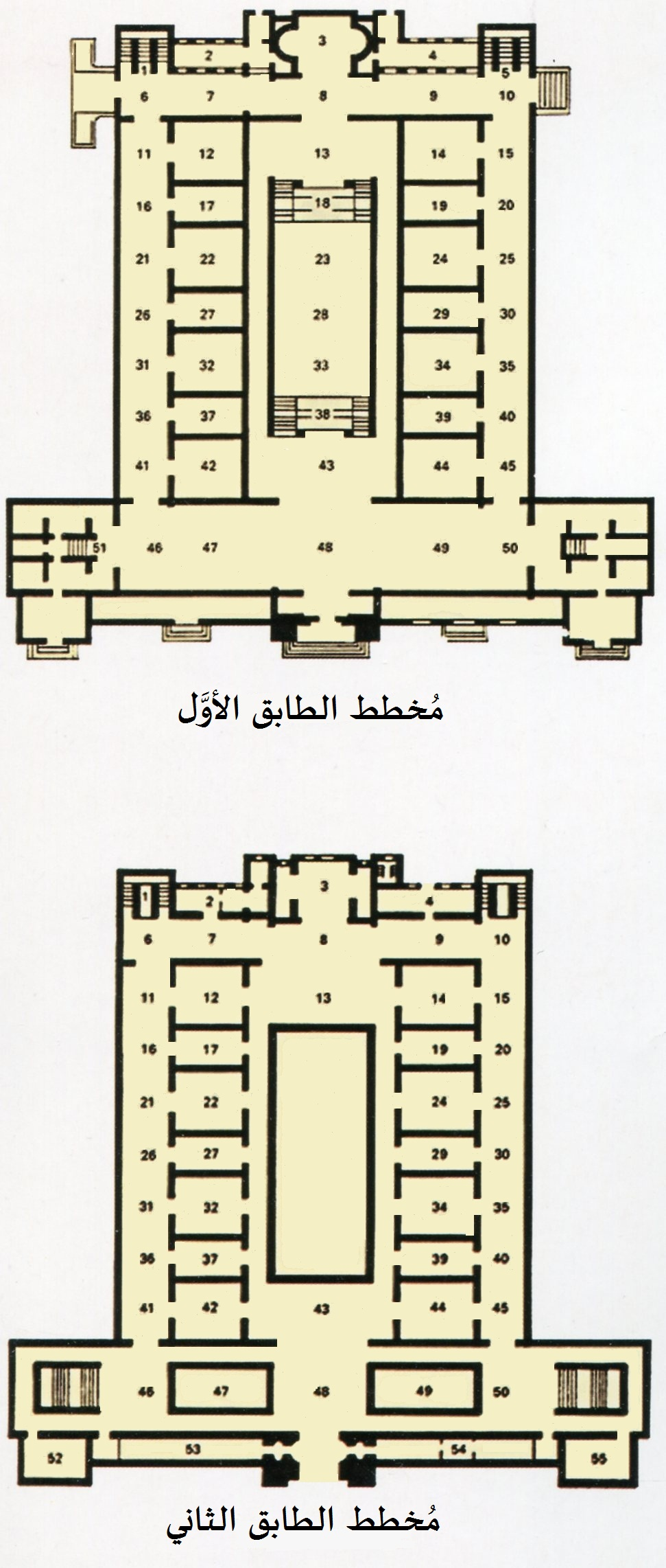 مُخطط المتحف المصري بالقاهرة.